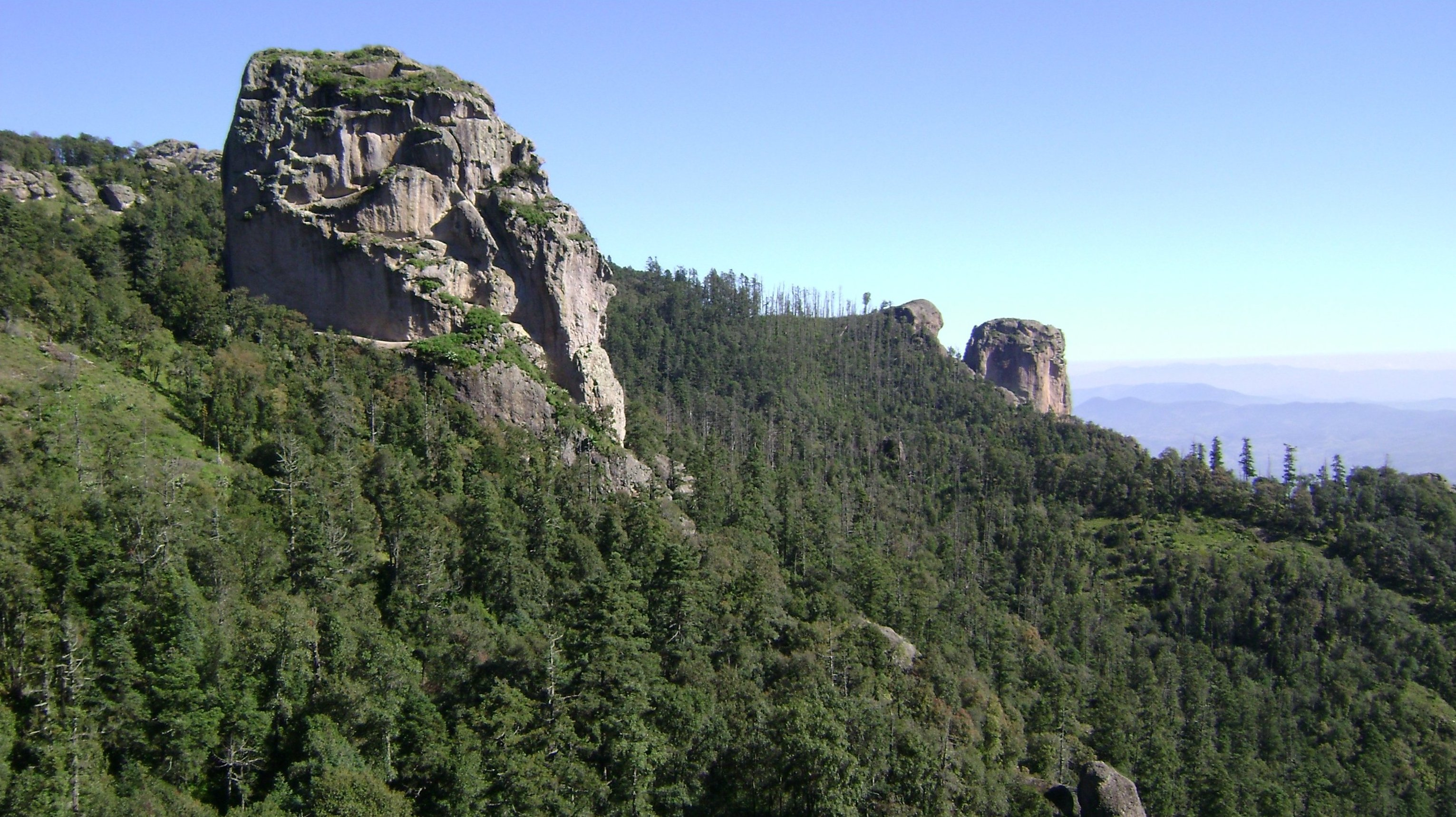 Parque Nacional El Chico, México.